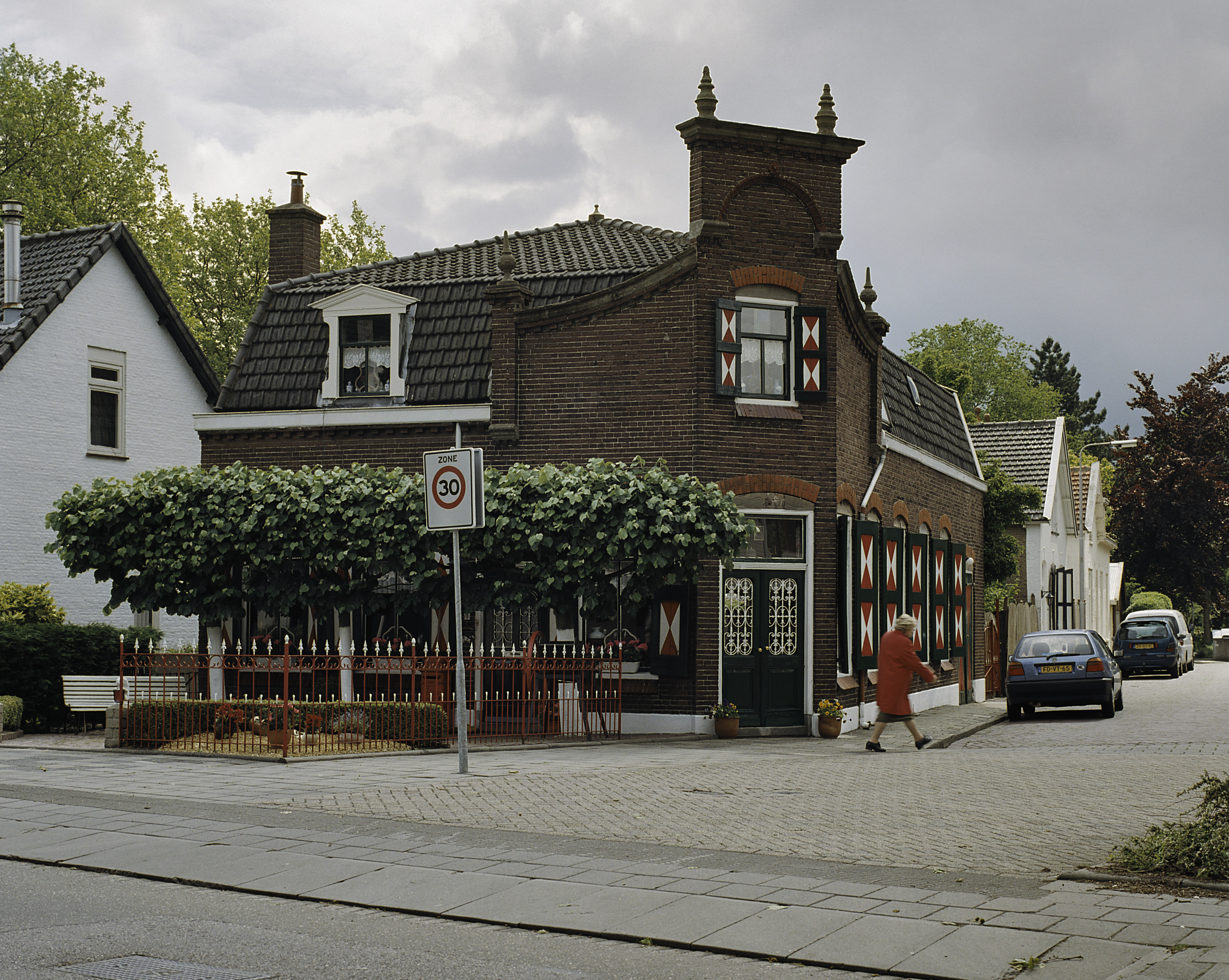 Winkel: Overzicht ingangspartij (opmerking: Gefotografeerd voor Monumenten In Nederland Zuid-Holland)